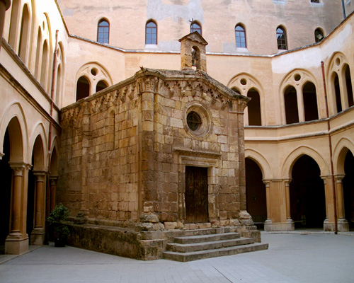 Capella de Sant Pau (s. XIII), al claustre del Seminari de Tarragona, en commemoració de la predicació de Sant Pau a la ciutat.